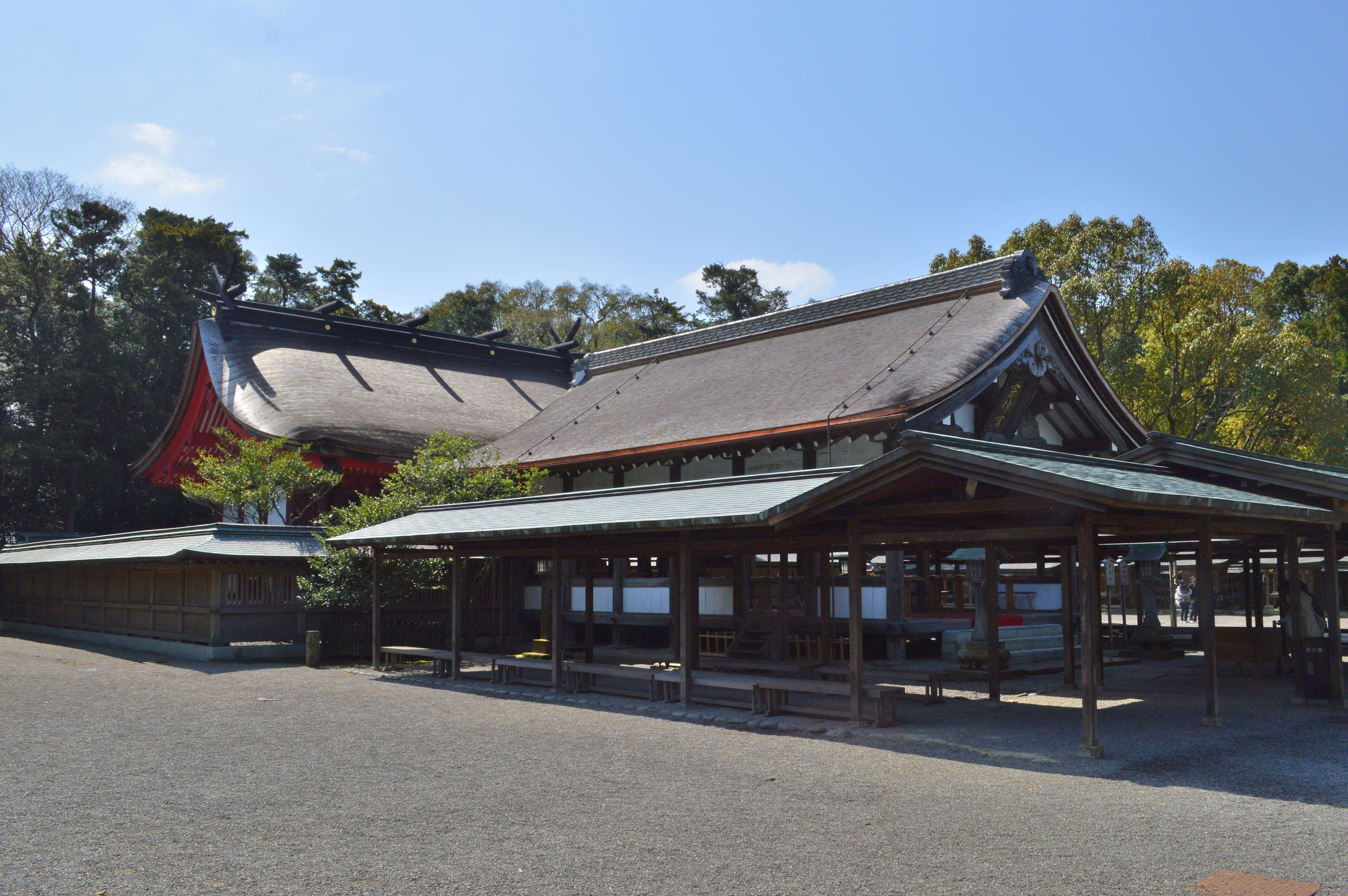 宗像大社 社殿